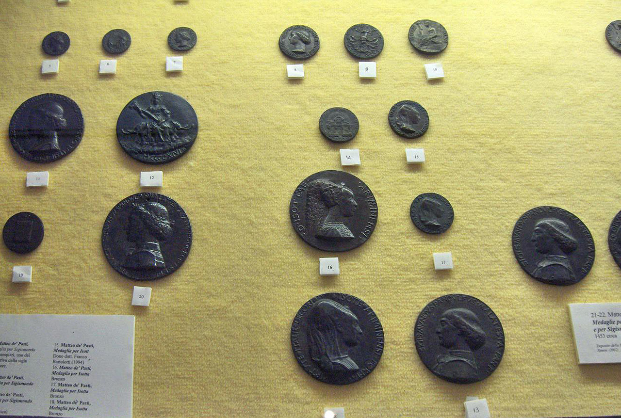 Medallions of Sigismondo Malatesta and Isotta by Matteo de' Pasti, found in the Temple of Malatesta, Rimini, Italy. Museo della città di Rimini.